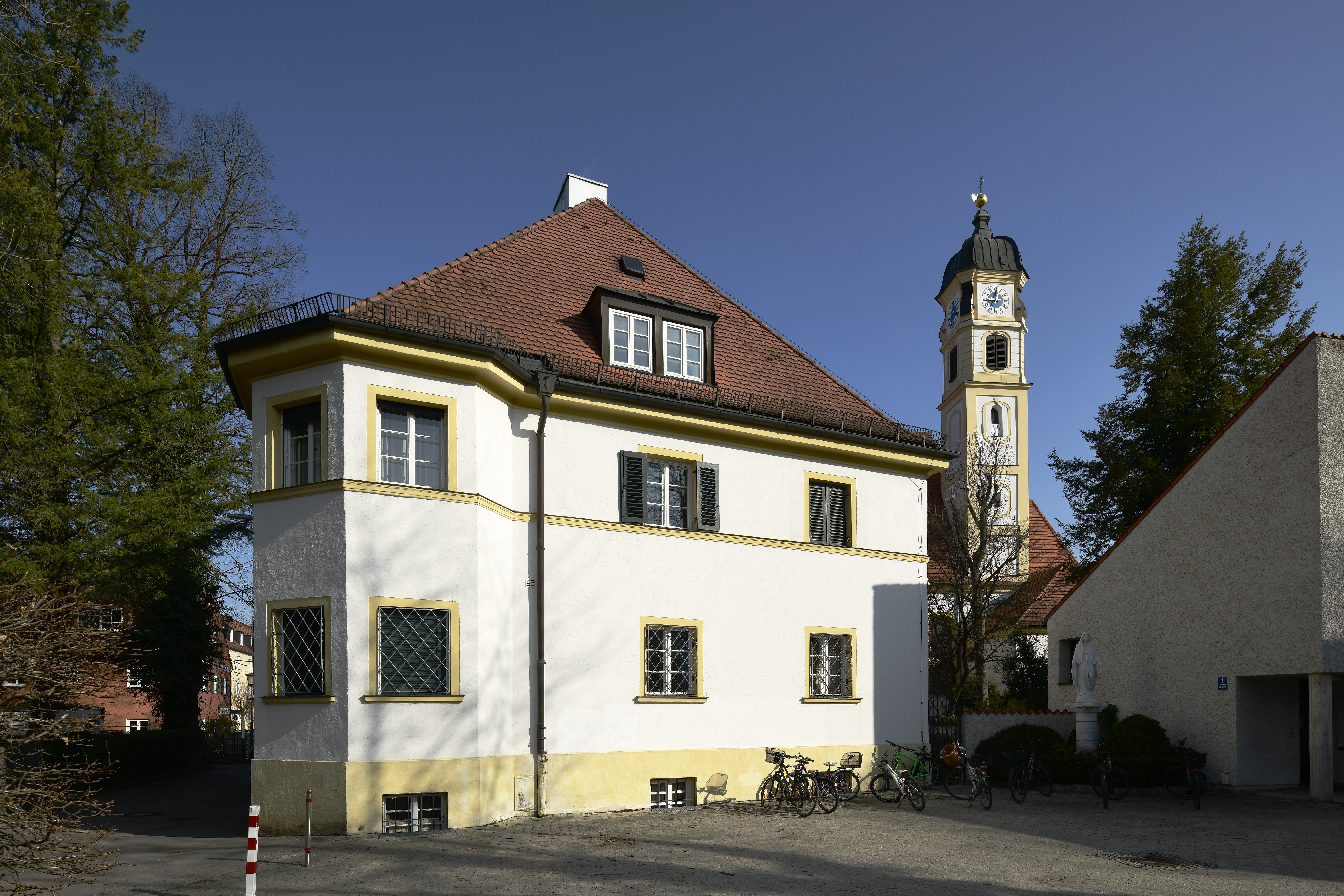 München, Thalkirchen. Ansicht des Fraunbergplatz 5, Rückseite, Kirchplatz 1. (Kath. Pfarrhaus, 1926-27 von Ludwig von Weckbecker.) Mit Kirchturm der St. Maria.